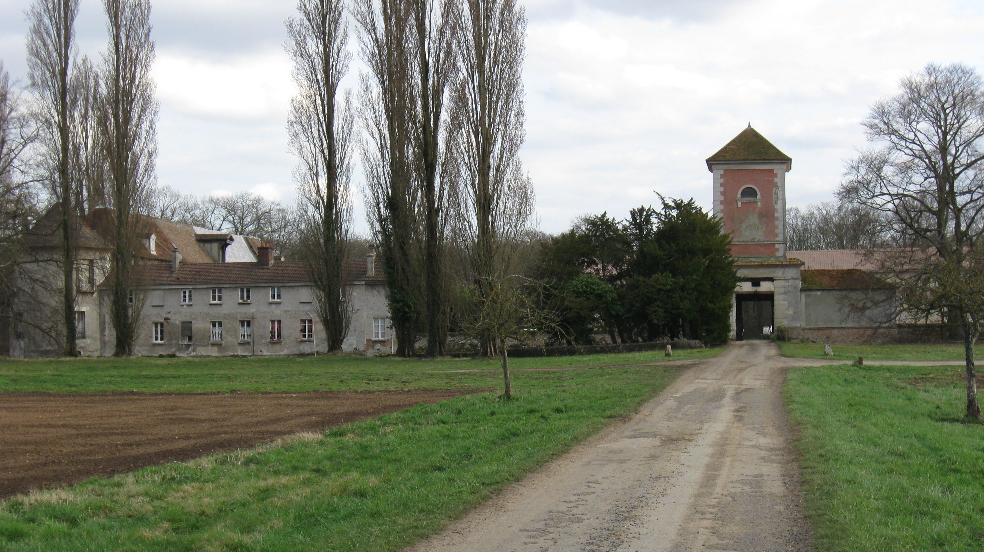 La ferme de Lamirault, communes de Croissy-Beaubourg et de Collégien. (Seine-et-Marne, région Île-de-France).